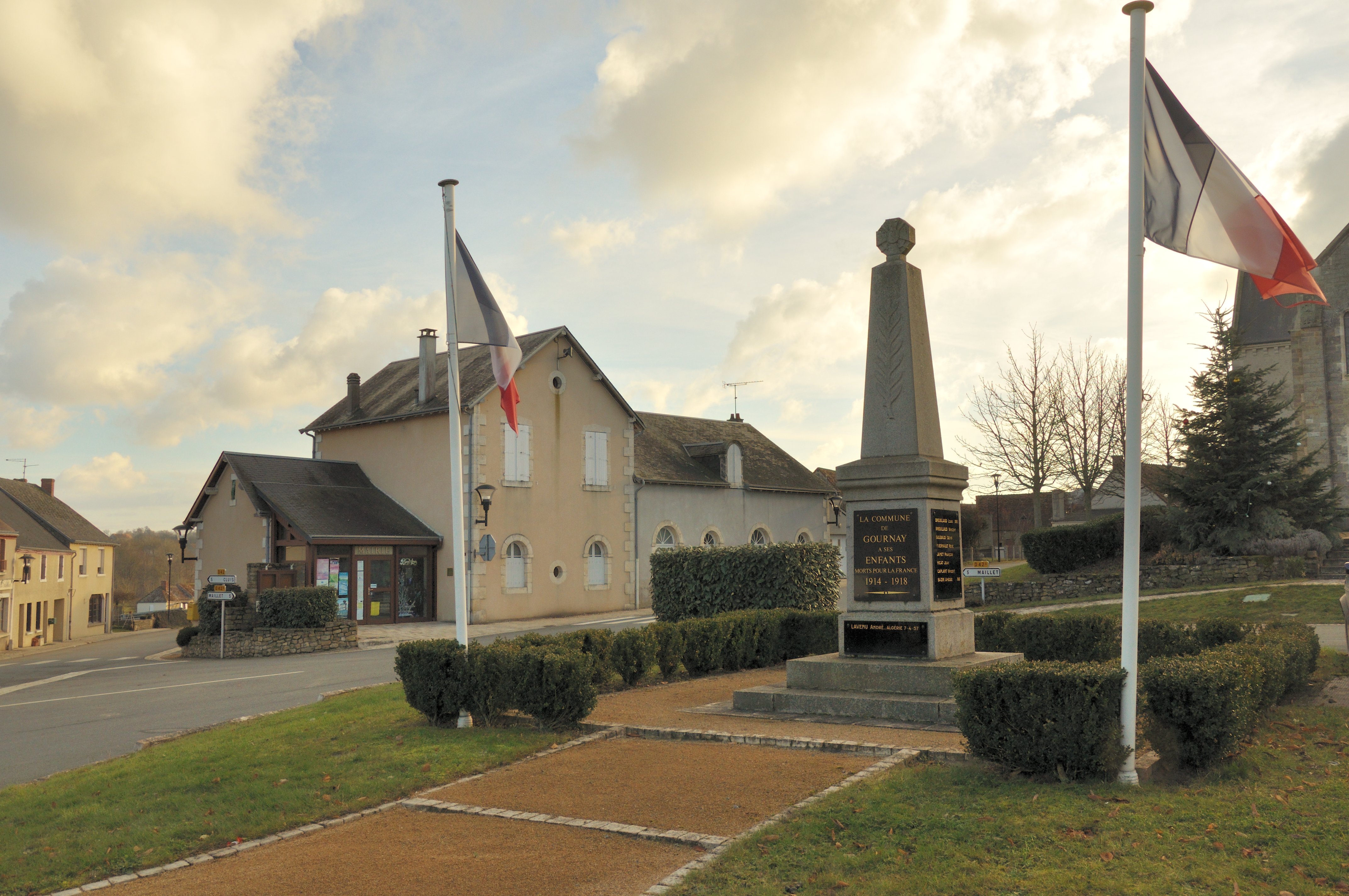 Gournay (Indre) - Place de la mairie